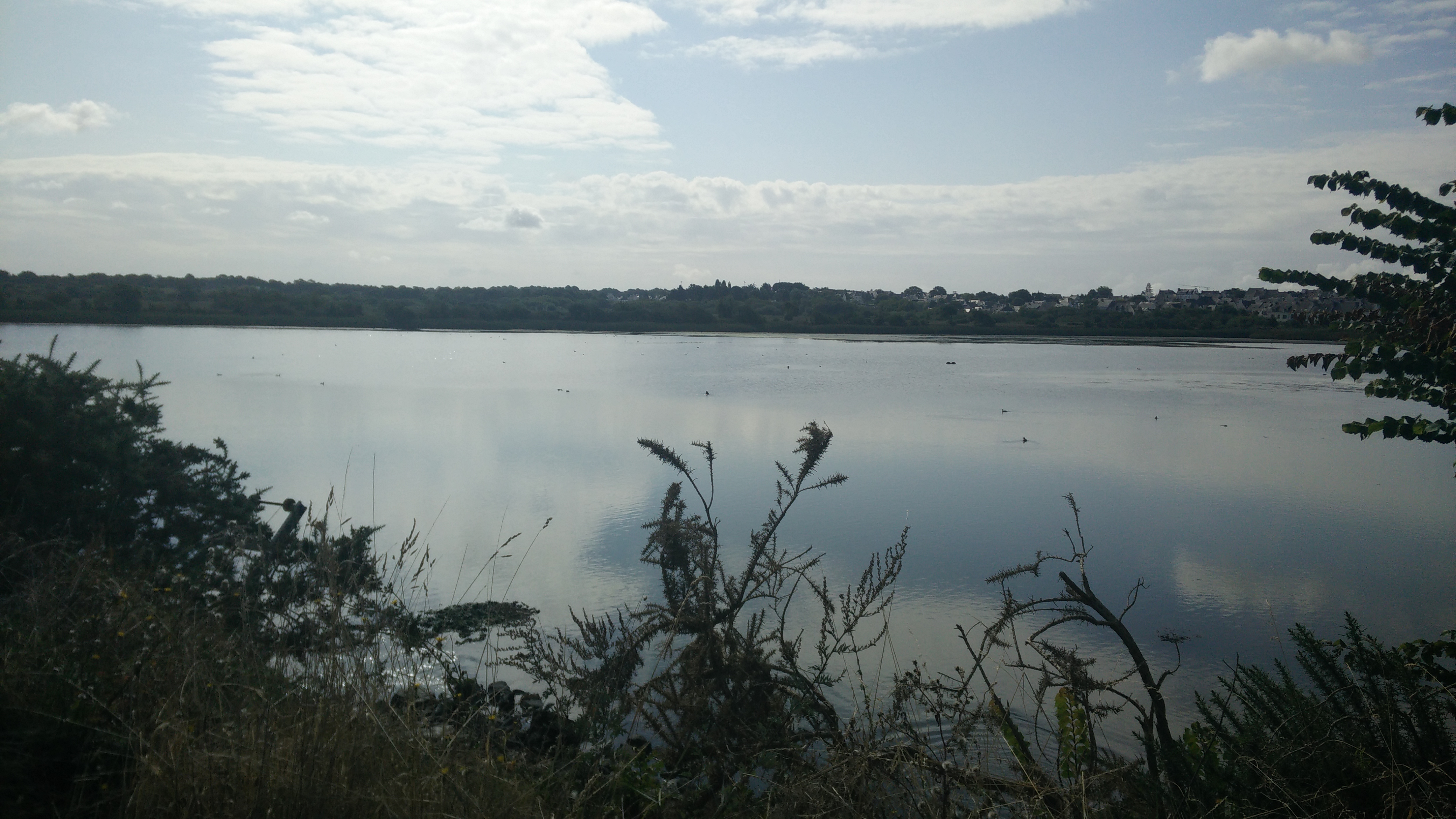 Vue depuis la digue de Pen mané sur la retenue d'eau formé afin de protéger le littoral